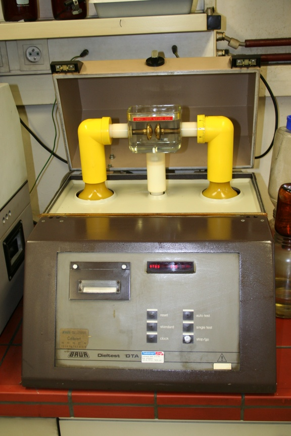 Olie doorslagspanningstester in het CG chemisch labo